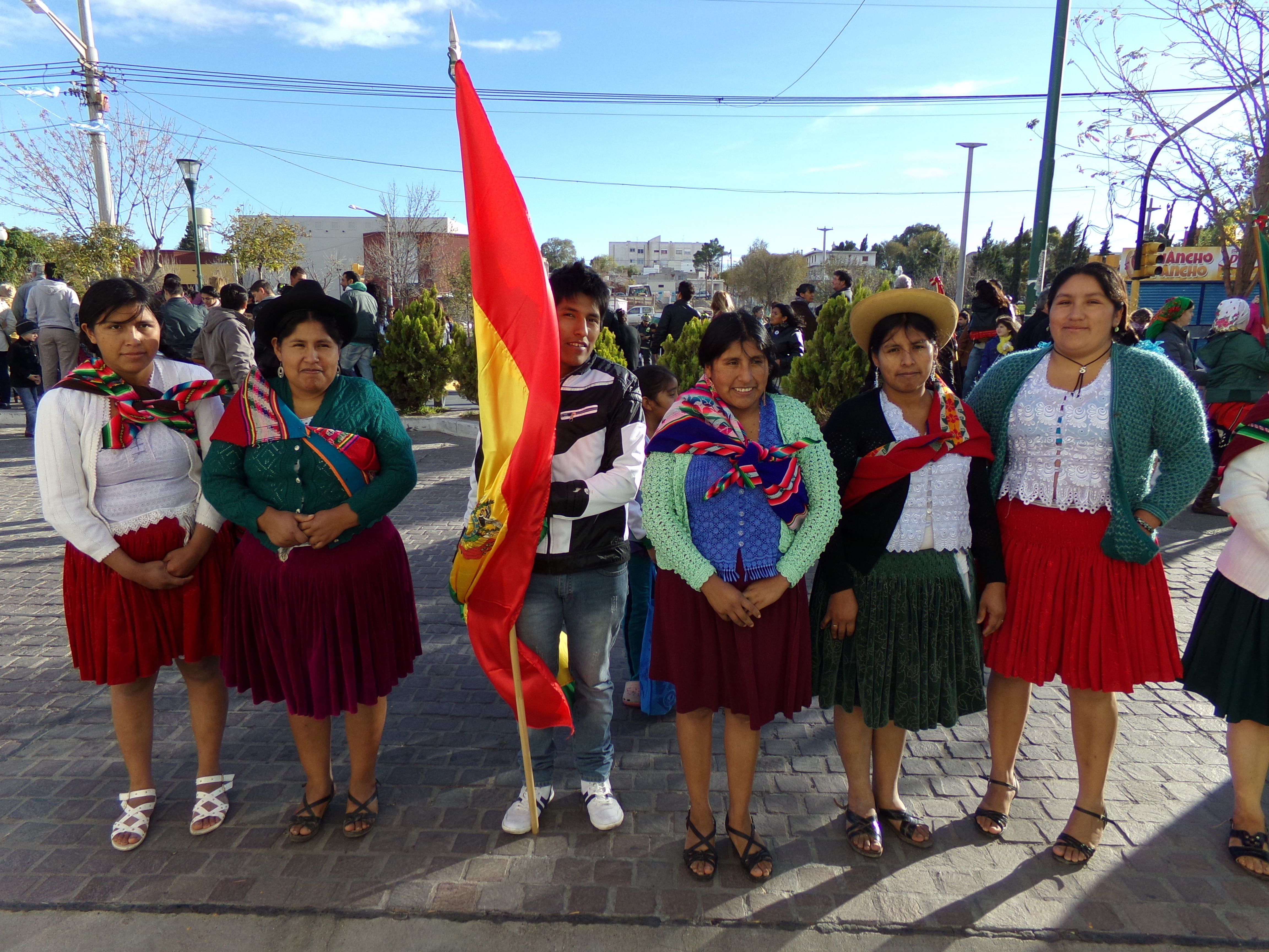 Colectividad boliviana de Trelew, Argentina, en el acto del 25 de mayo de 2015